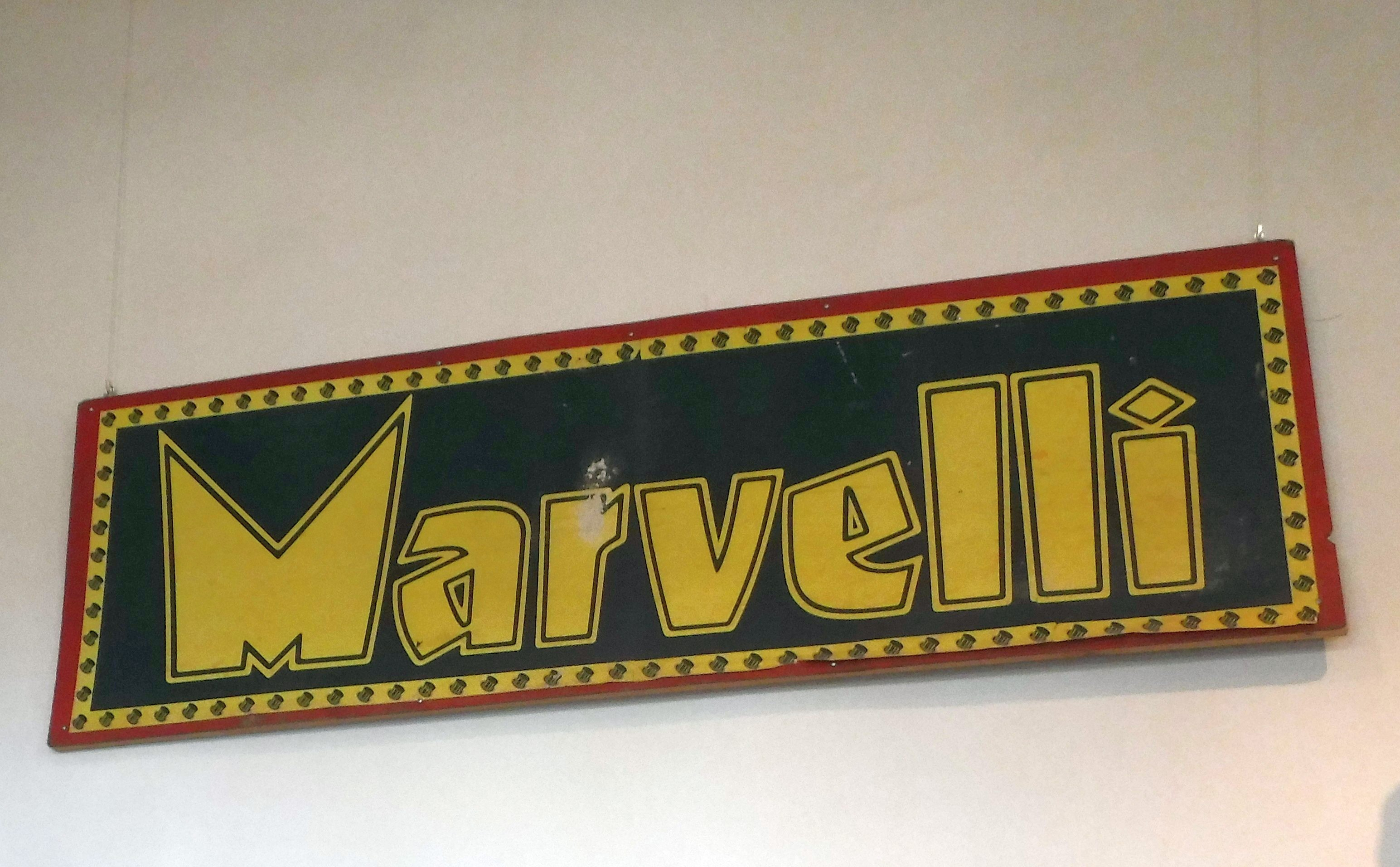 Das denkmageschützte Renaissance-Schloss Schönfeld in Dresden. Zauberkunstmuseum mit Schild von Fredo Marvelli